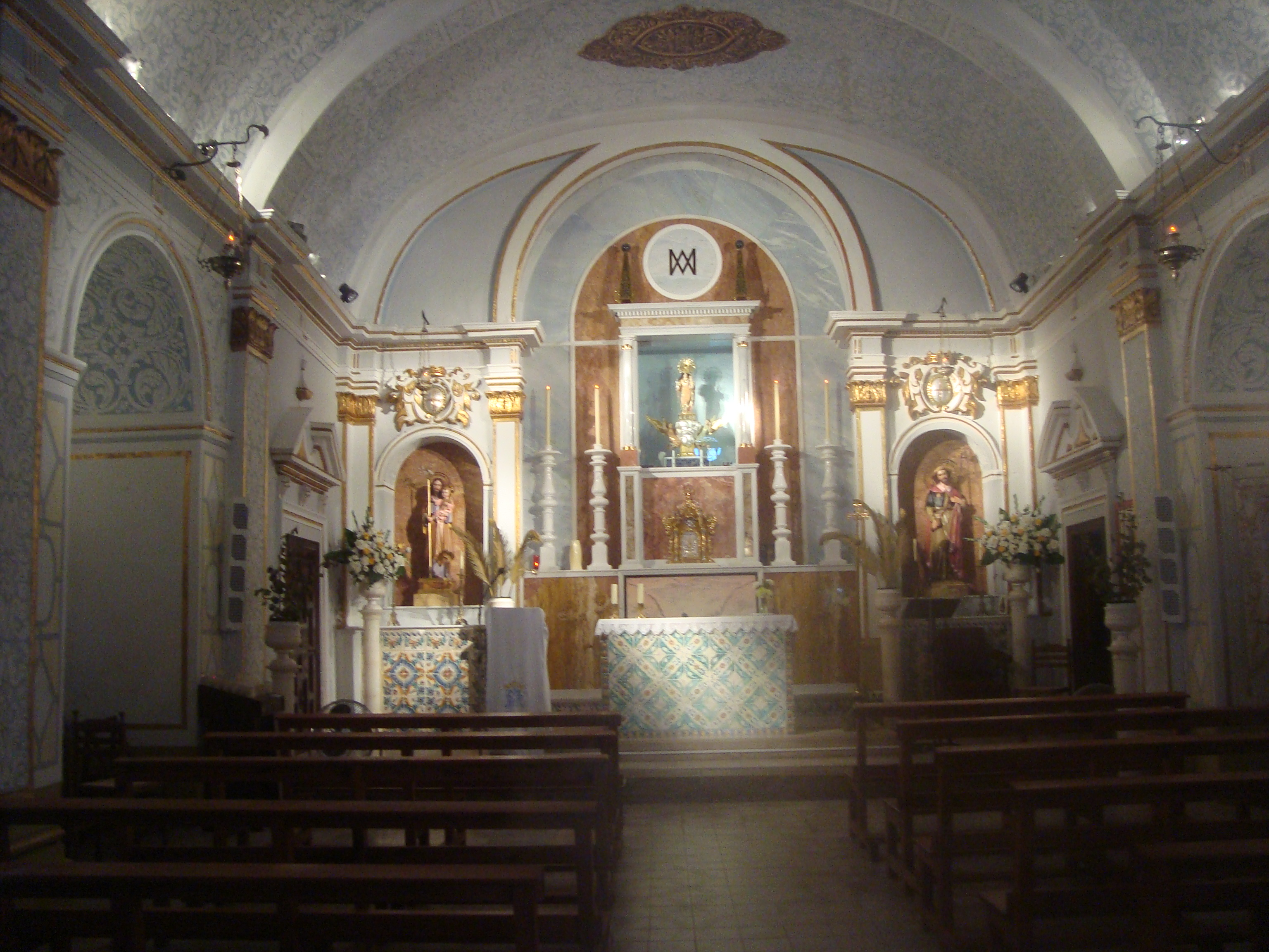 Capilla de Ntra. Sra. de la Paciencia de Orpesa